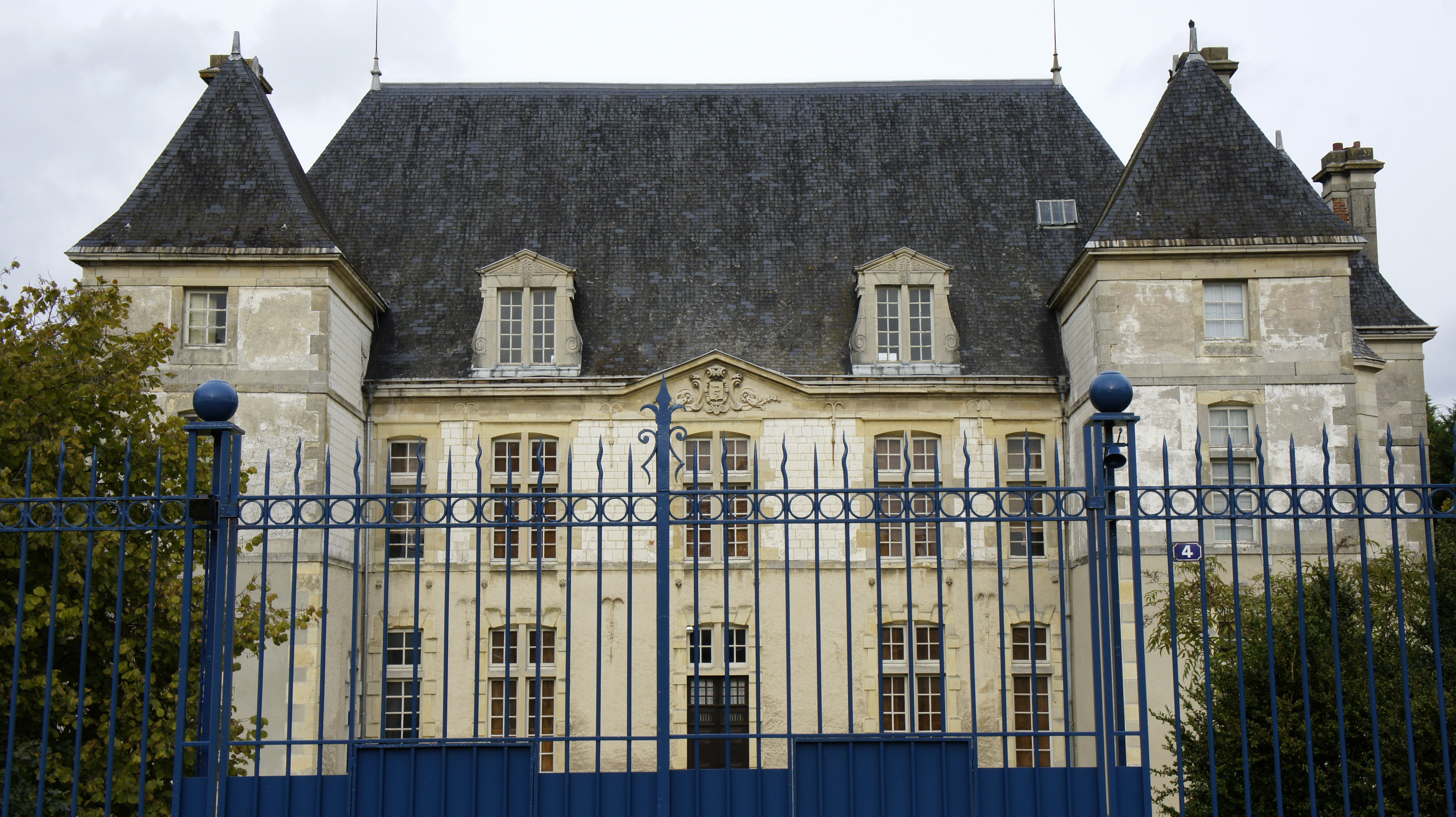 Vue du château de Taissy avec les armes de Colbert sur le fronton.